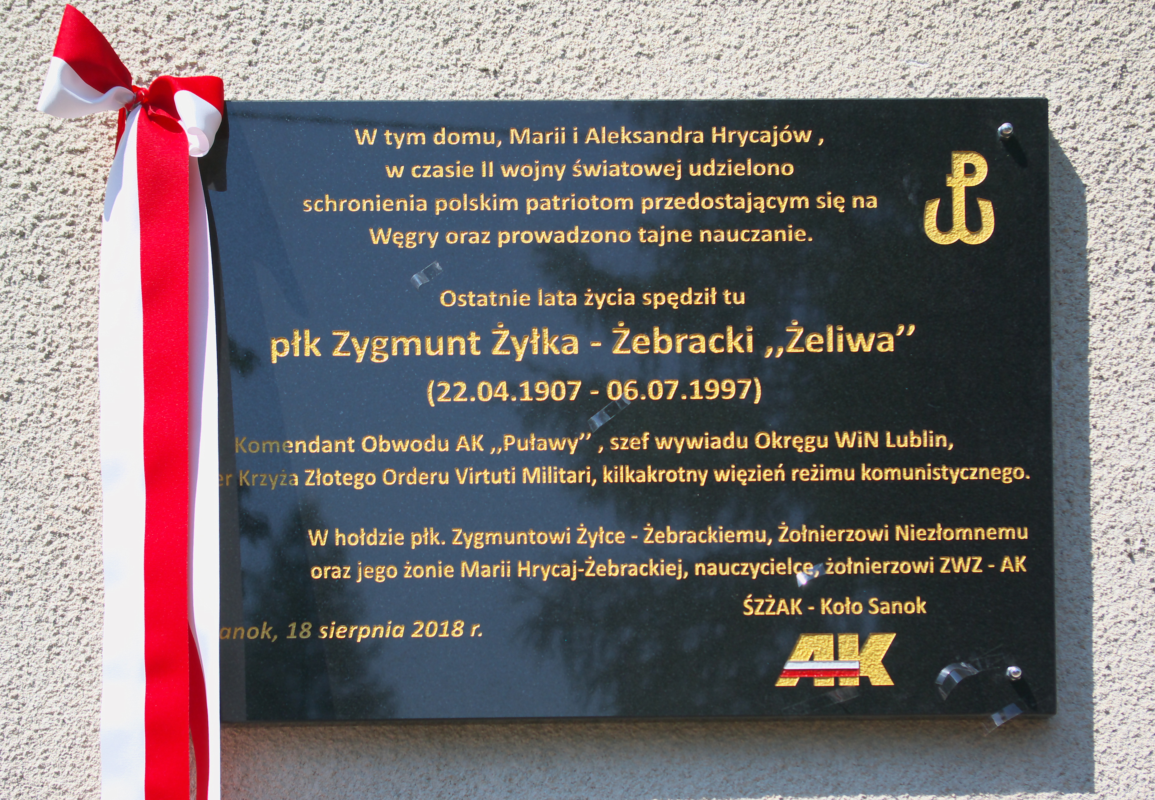 Odsłonięcie tablicy pamiątkowej poświęconej płk. Zygmuntowi Żyłce-Żebrackiemu na elewacji domu przy ul. Za Potokiem 3 w Sanoku w dniu 18 sierpnia 2018.